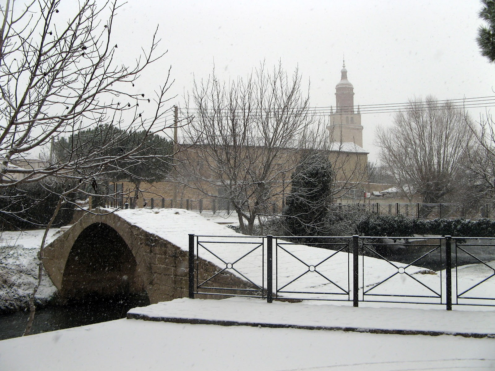 Frio y nieve en la localidad turolense de Calamocha durante la ola de frío siberiana de febrero de 2012